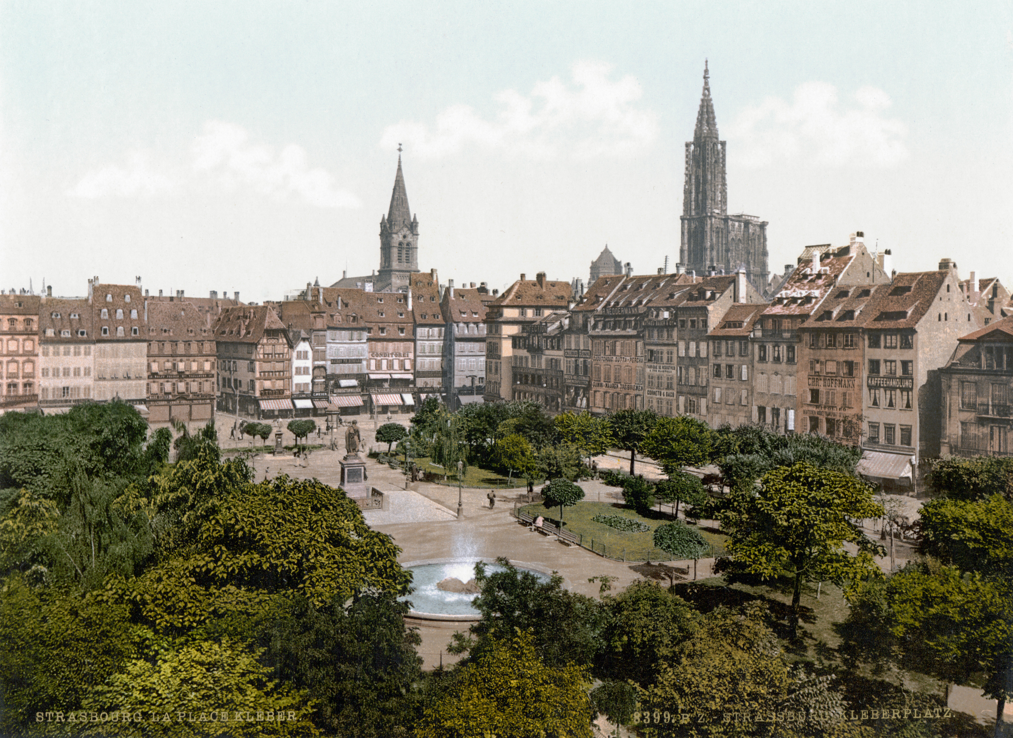 Strassburg Kleberplatz um 1900